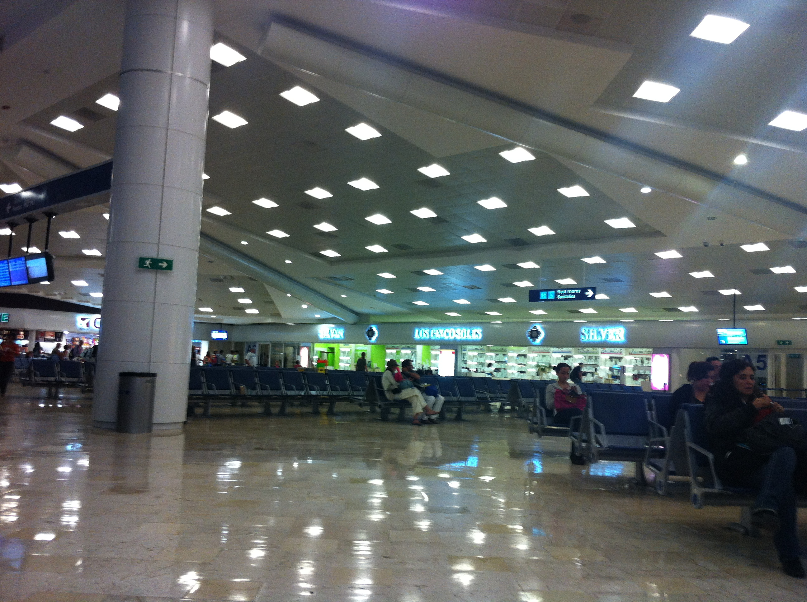 Salidas internacionales de la T2 en el Aeropuerto de Cancún